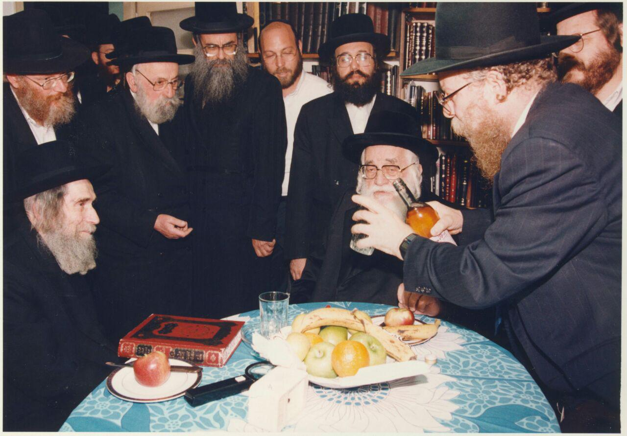 הרב משה יהושע הגר בביקור בביתו של הרב שטיינמן מזיגת לחיים